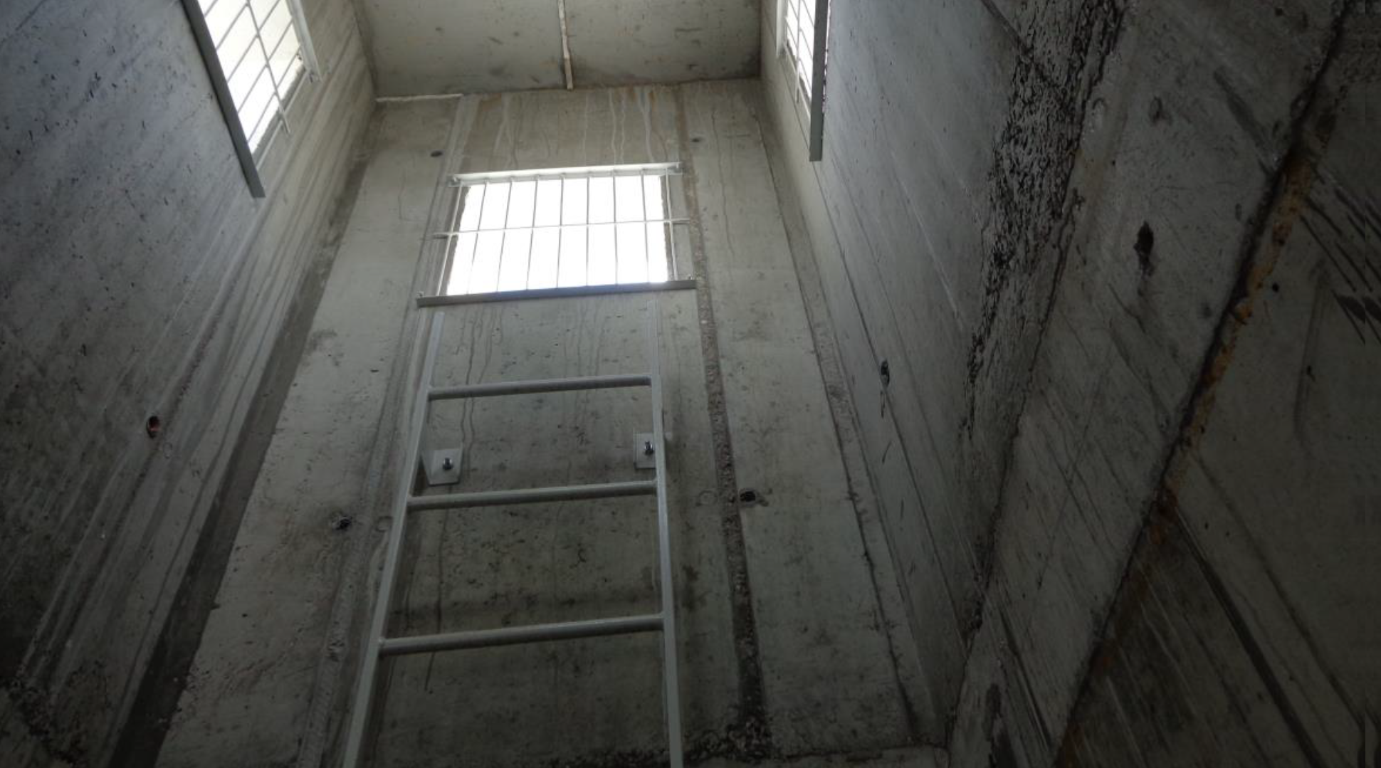 Szyb wyjścia zapasowego ze schronu powinien być wyposażony w klamry i co najmniej jedną kratę otwieraną do wewnątrz.